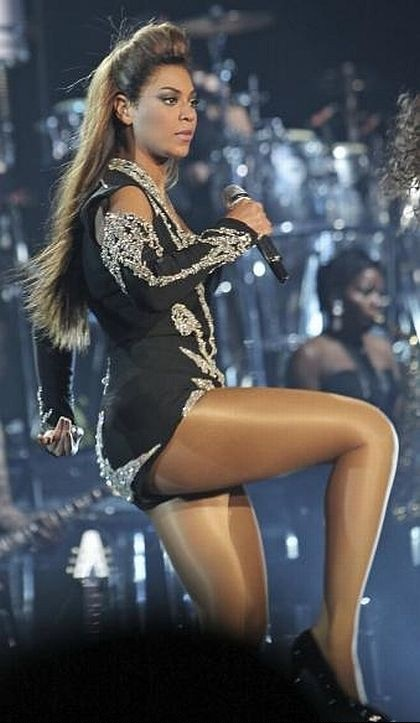 Beyonce durante el I am... Tour en Vancouver Canada